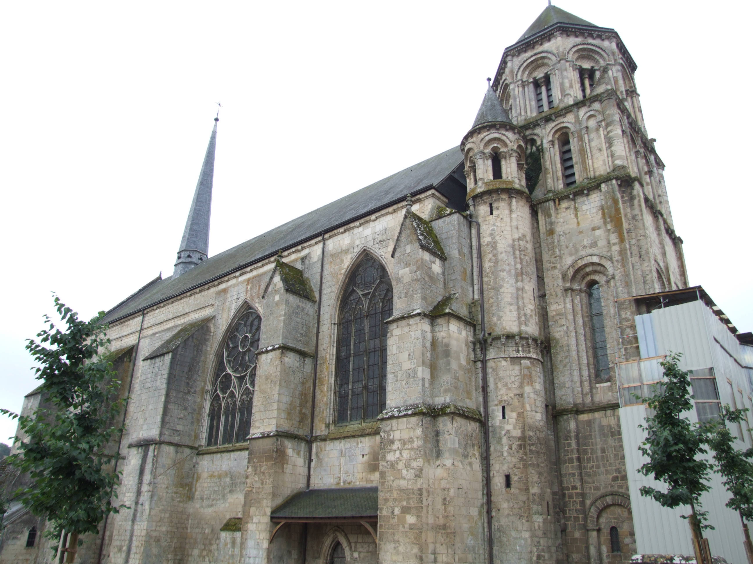 Église Sainte-Radegonde, Poitiers, Poitou-Charentes, FRANCE